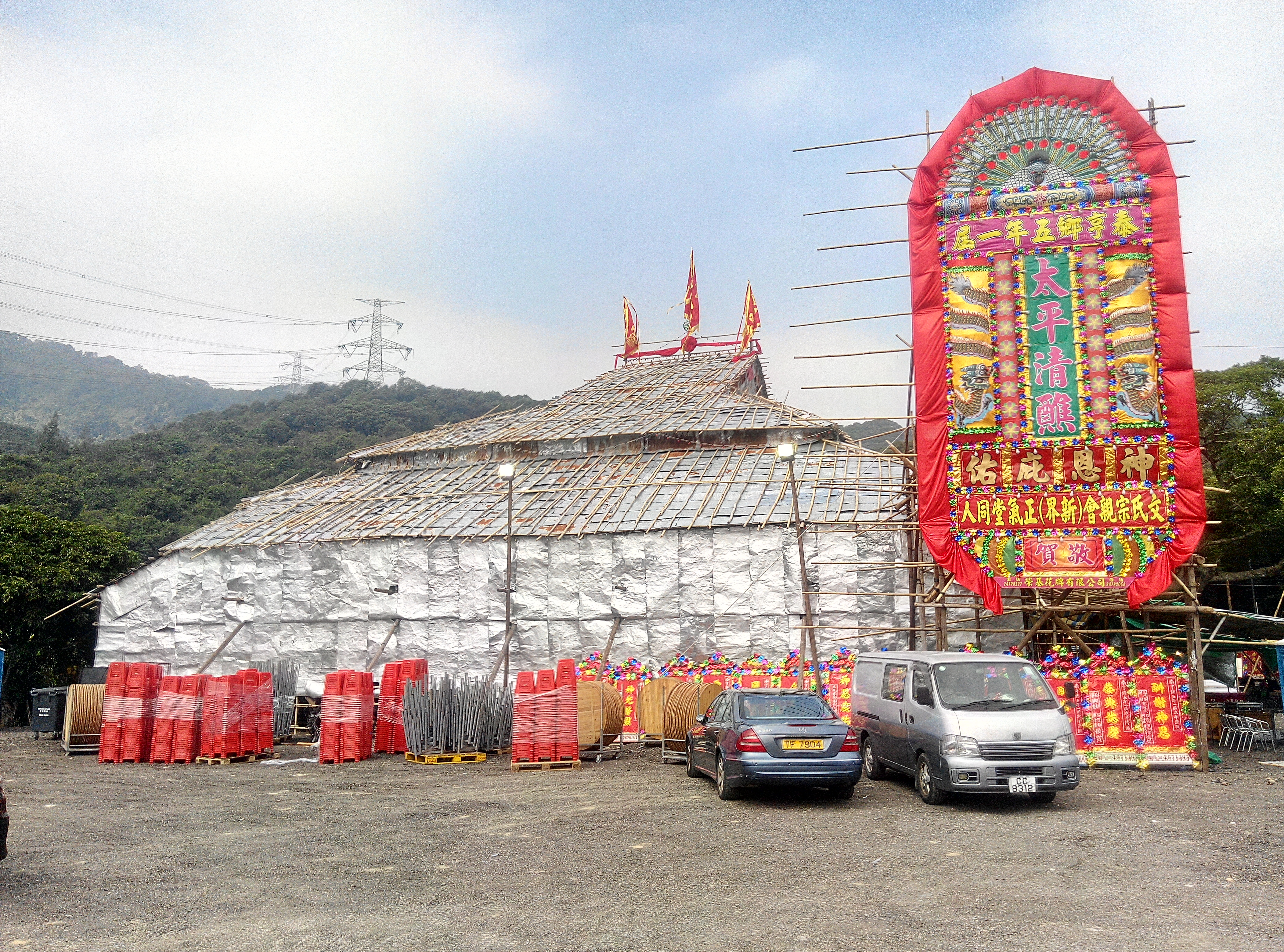 中文（香港）: 泰亨鄉乙未年太平清醮大戲棚